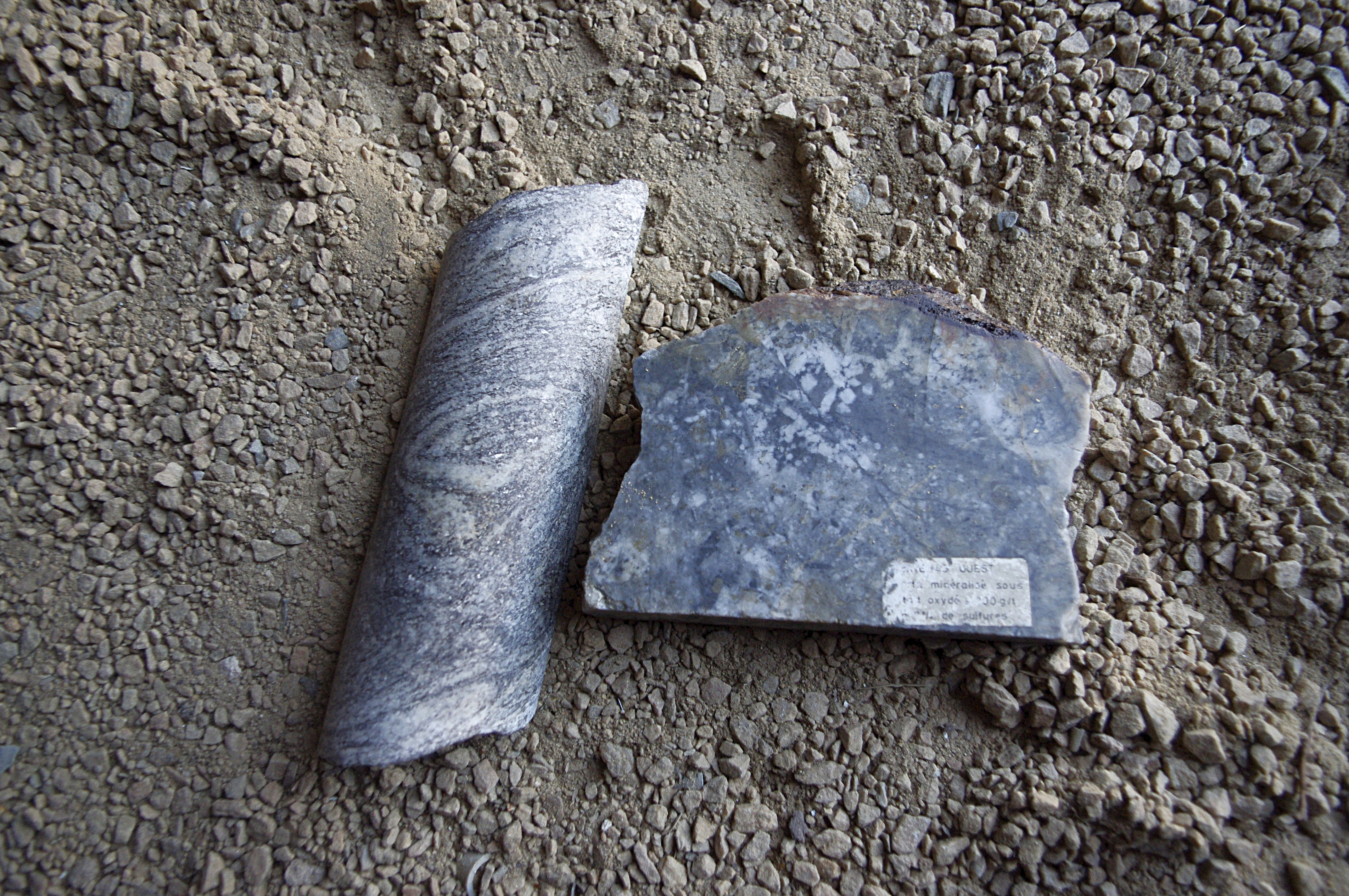 Goldhaltiger Quartz in der ständigen Ausstellung im Dorf Le Chalard, Haute-Vienne, Frankreich